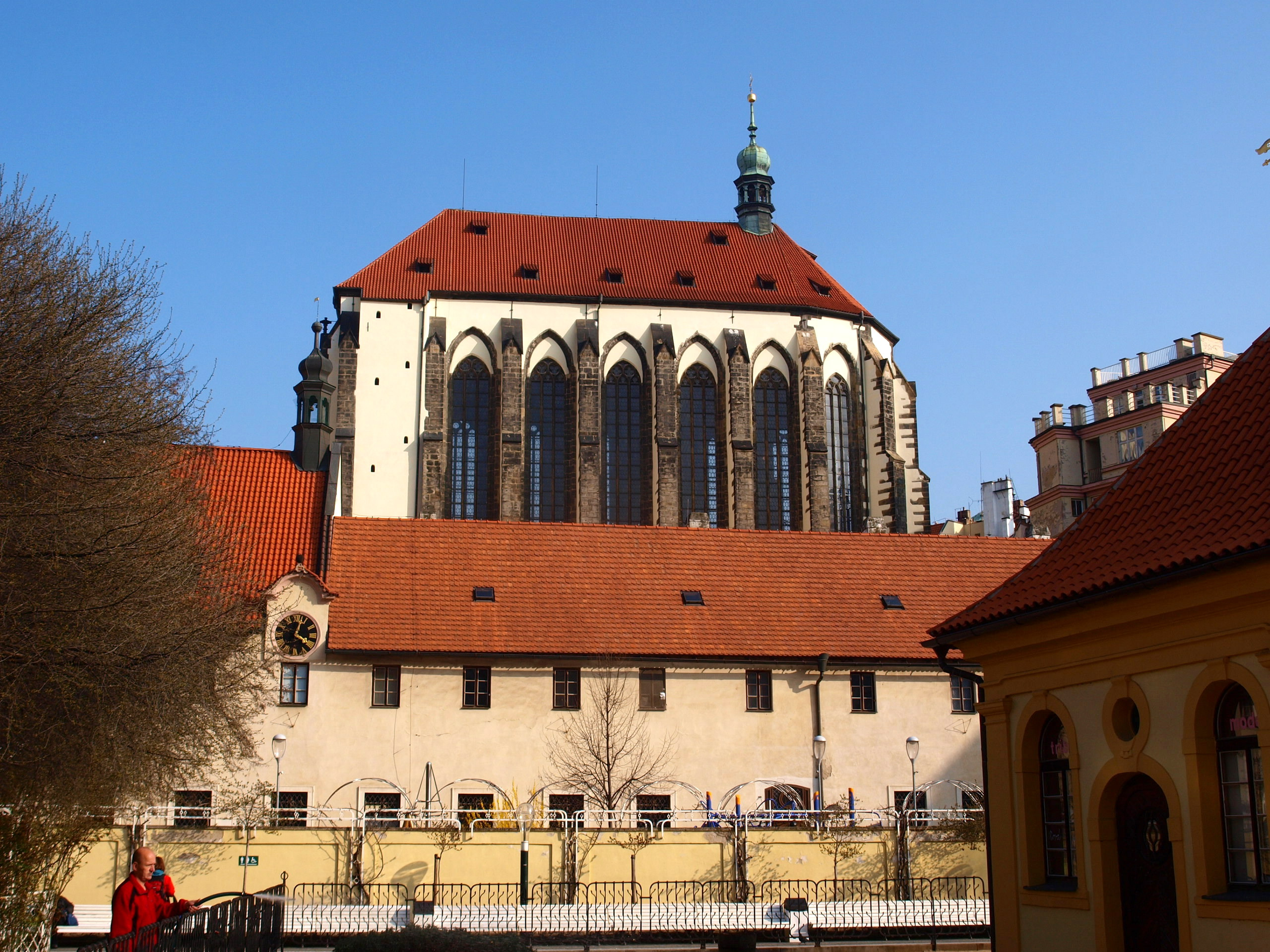 Praha, kostel Panny Marie Sněžné